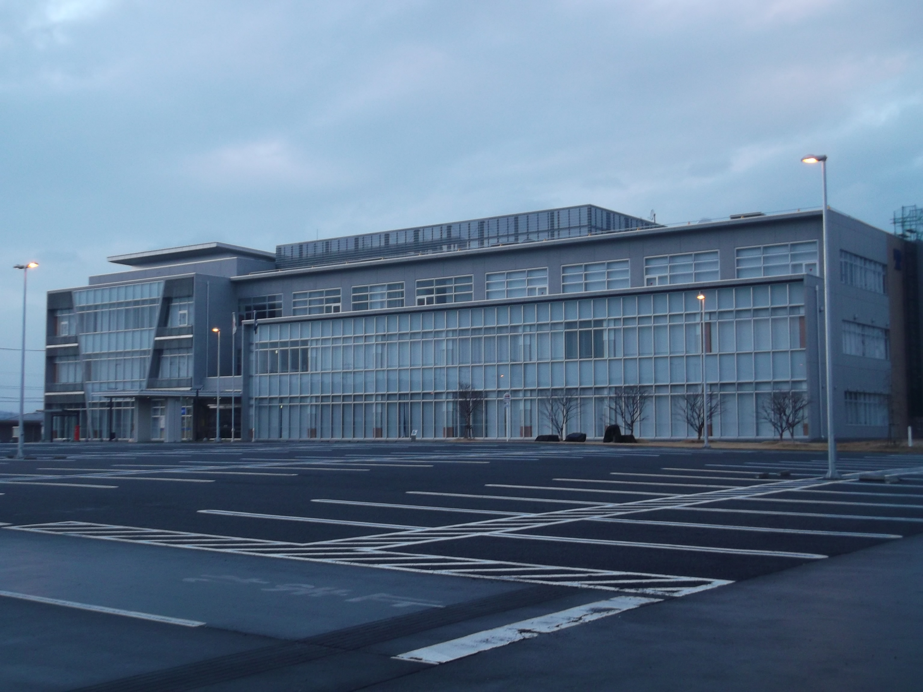 宮城県黒川郡大和町役場